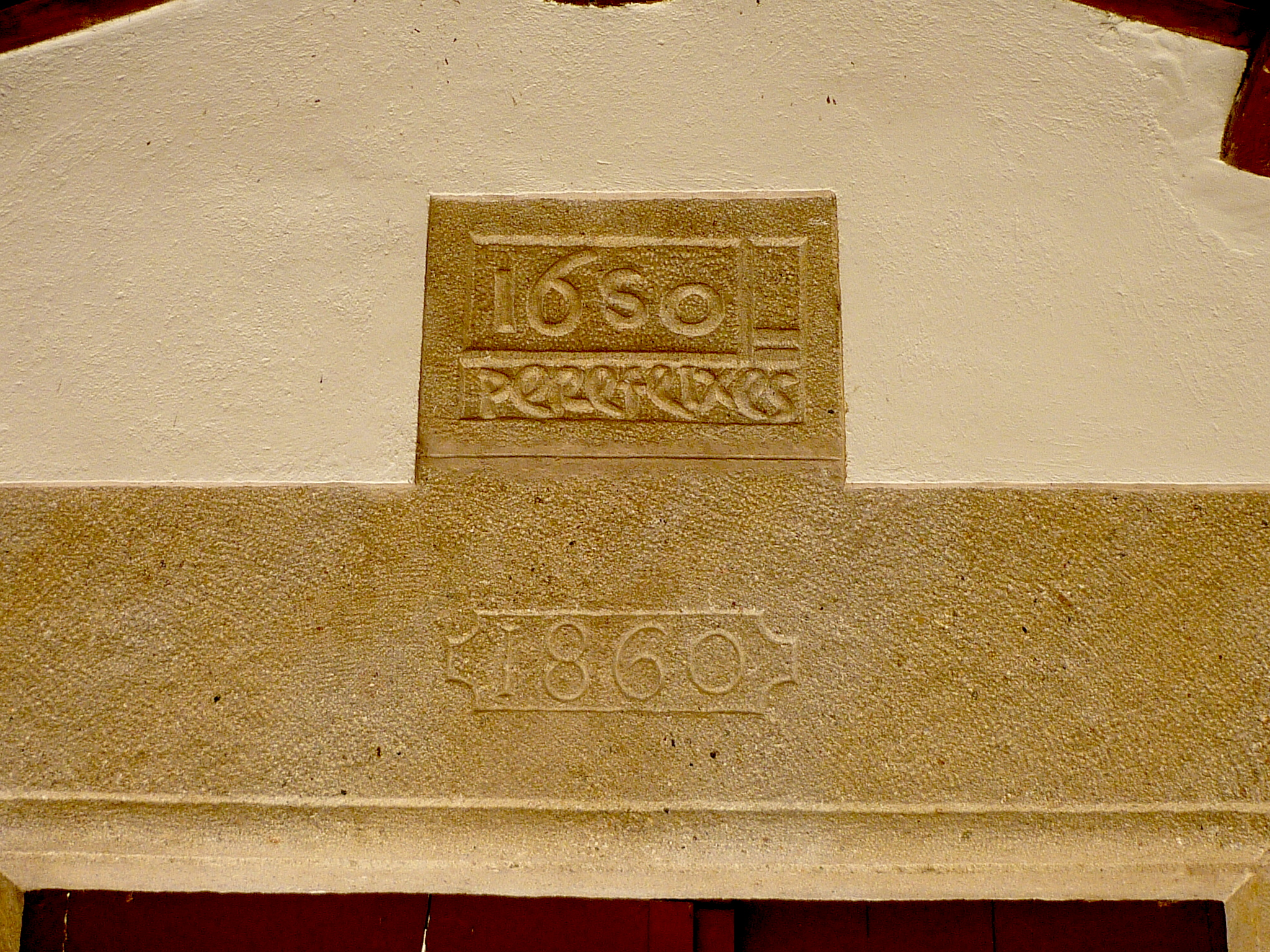 Capella de Sant Pere Màrtir (Solsona): inscripció a la llinda